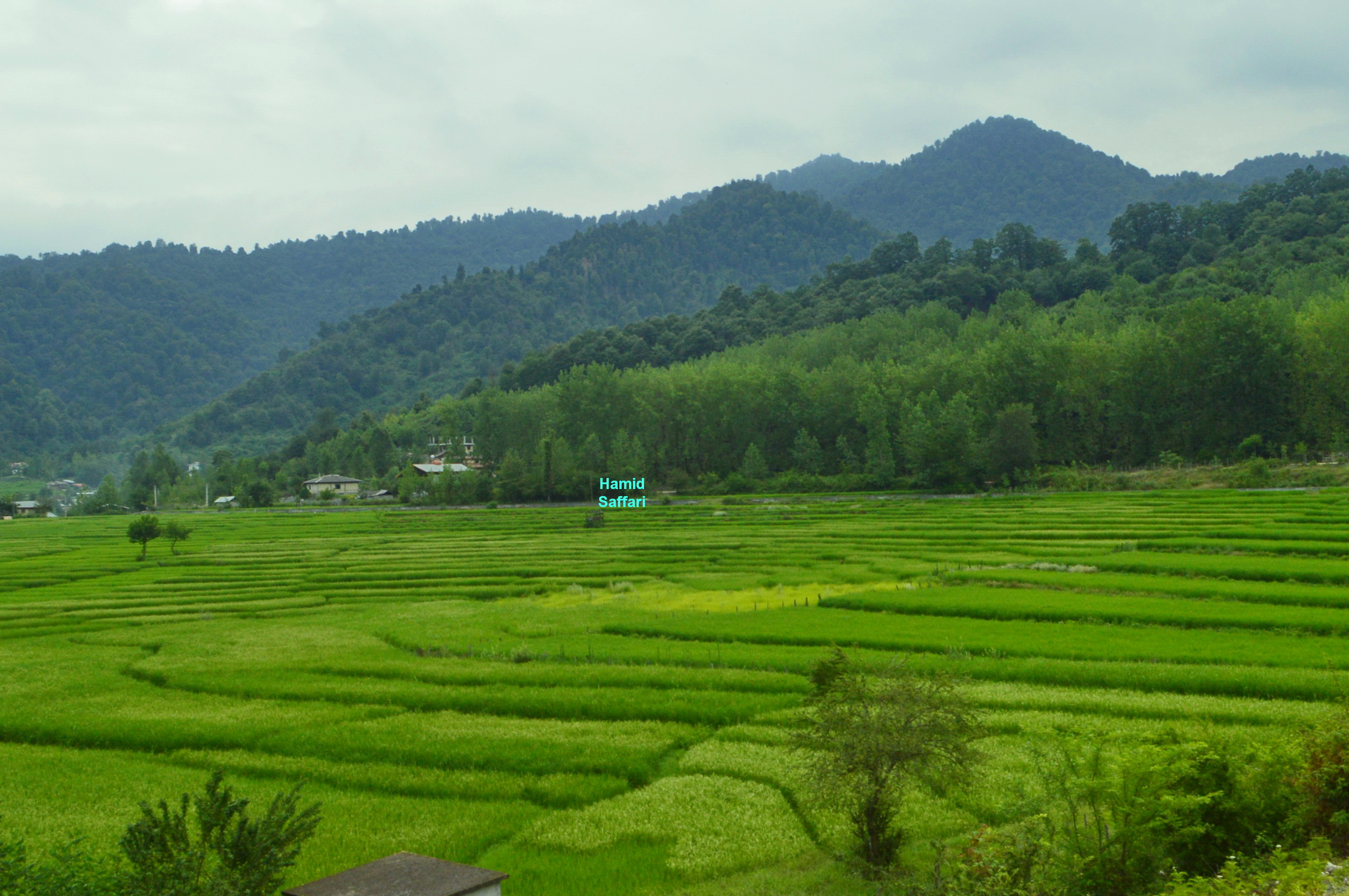 سرآگاه ، استان گیلان ، ایران